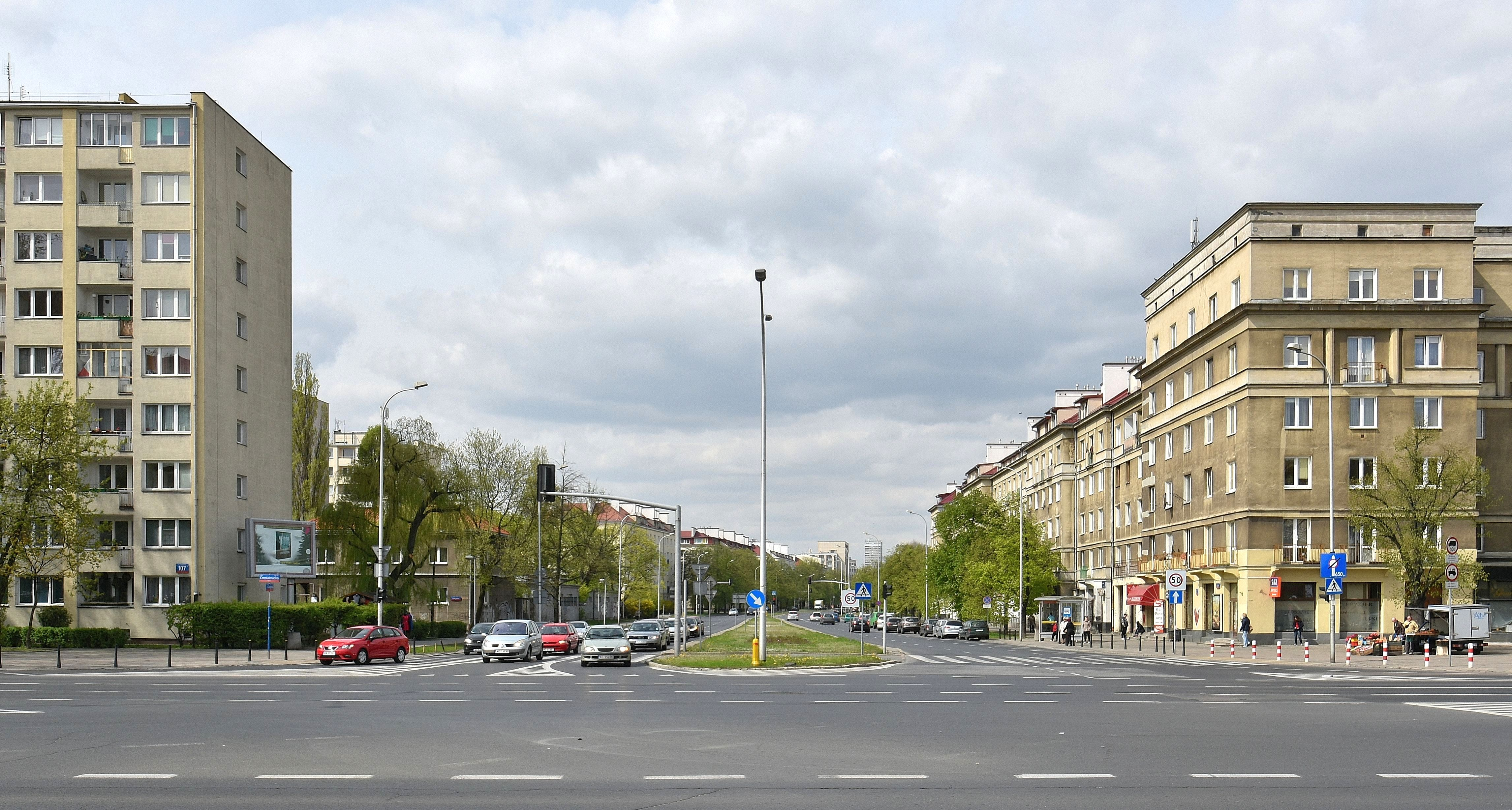 Ulica Jurija Gagarina przy ul. Czerniakowskiej w Warszawie